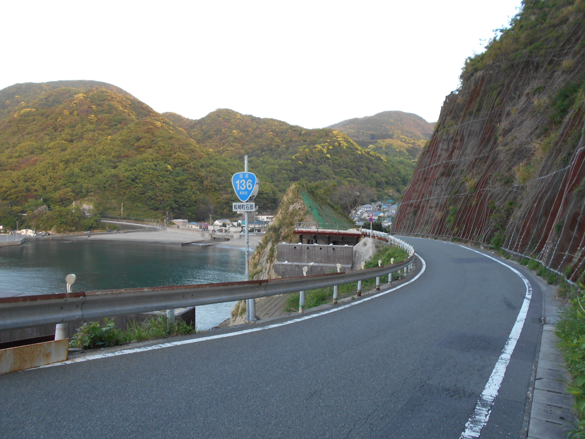 国道135号 静岡県松崎町石部